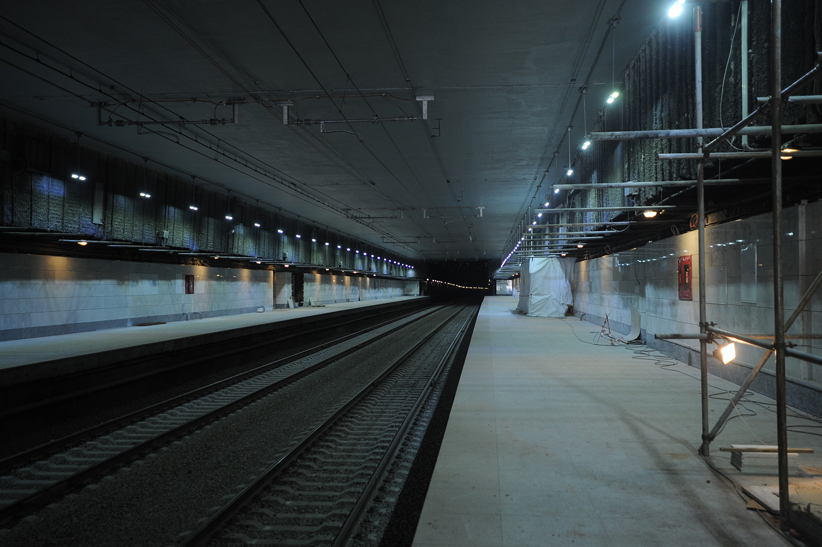 Платформа Площадь Гагарина в процессе отделки